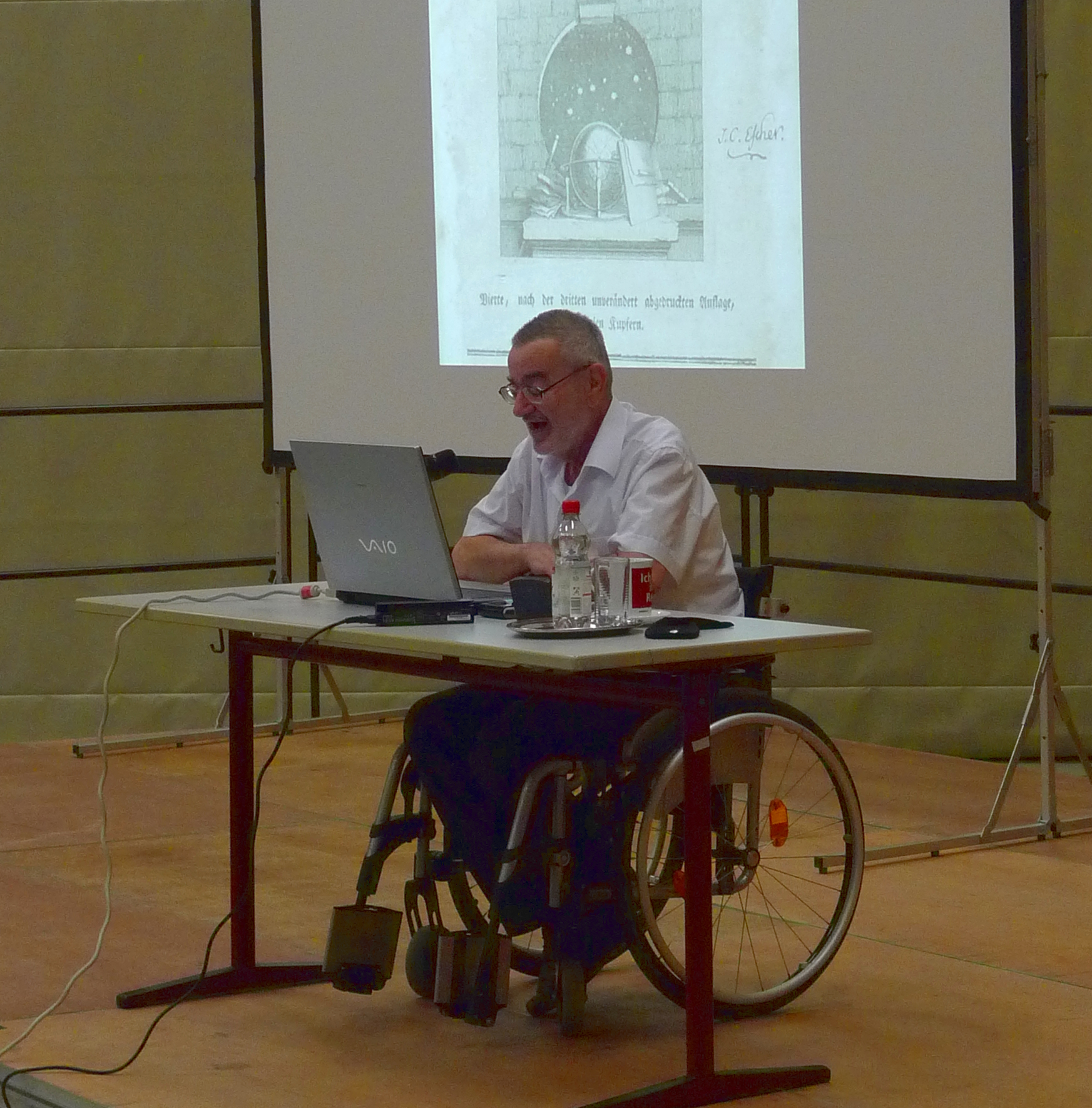 Prof. Ruder bei einem öffentlichen Vortrag November 2012